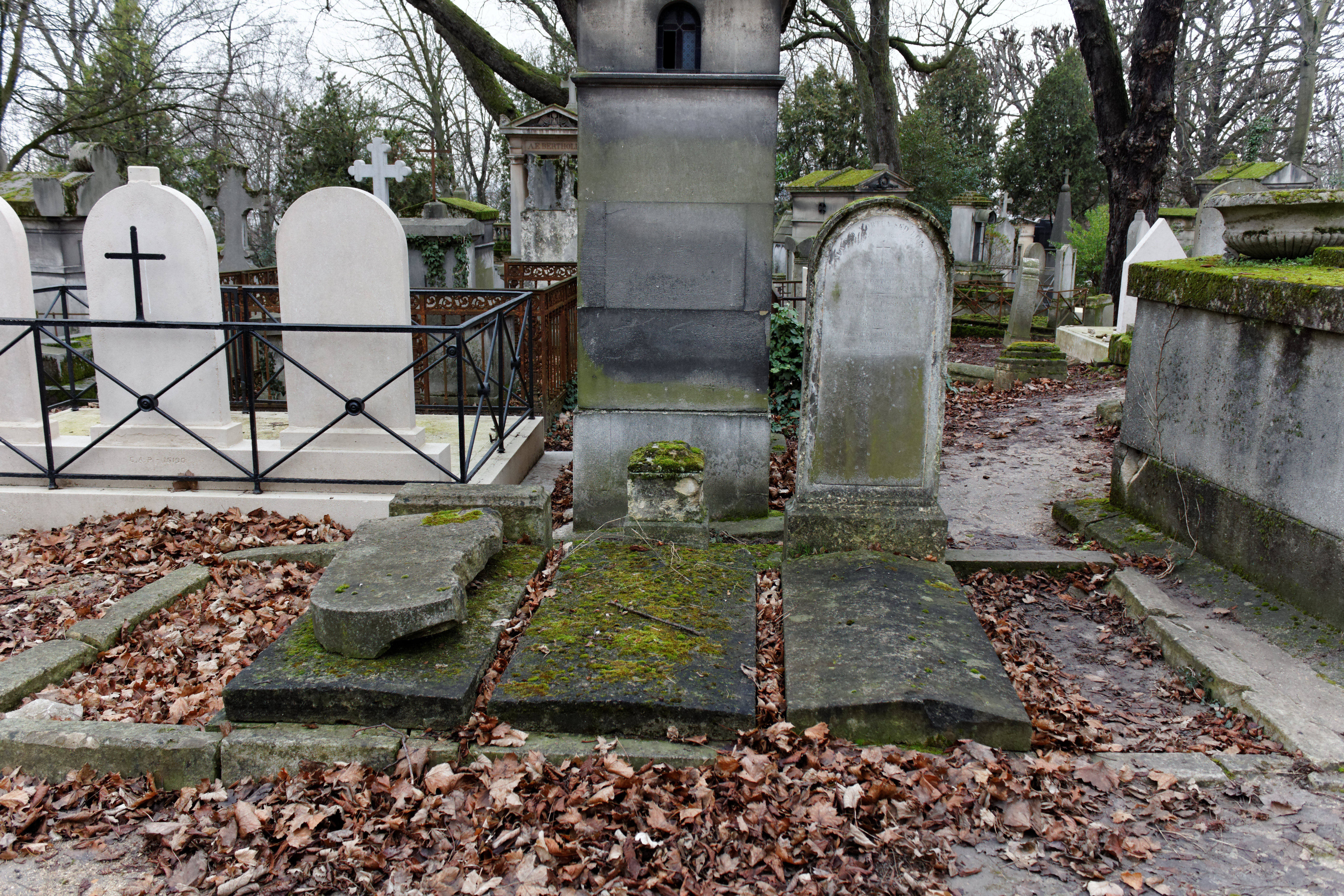 Vue d'ensemble